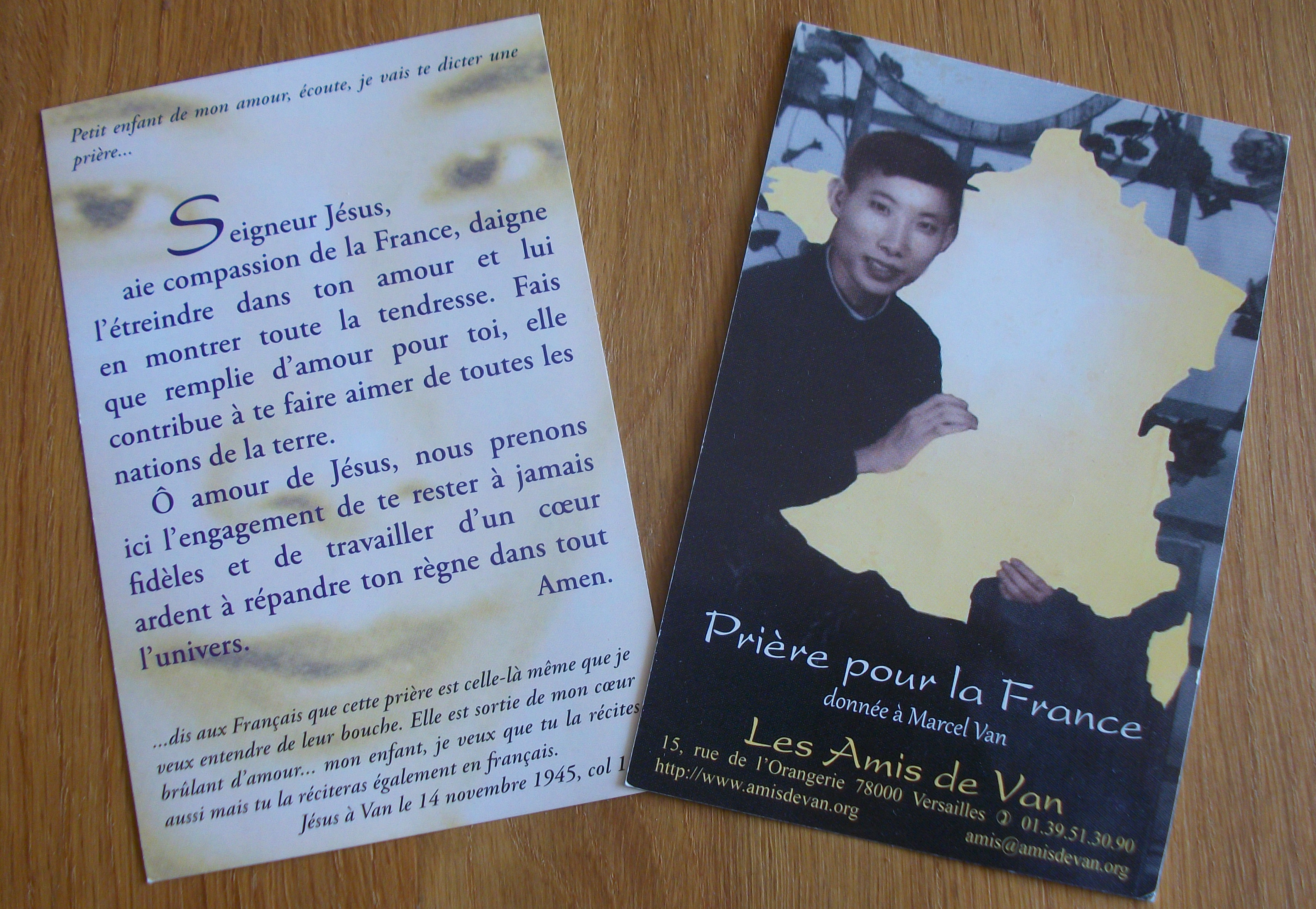 Imagettes de la prière pour la France, de Marcel Van.